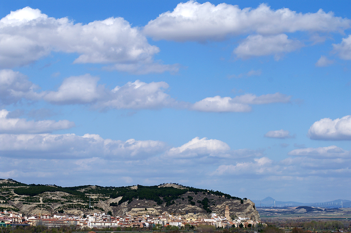 Peralta; vista general desde Funes.